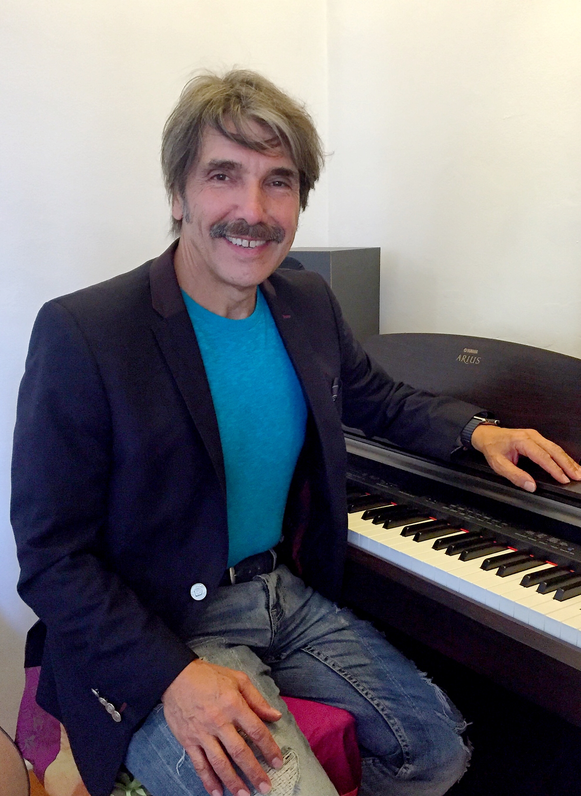 Foto tomada durante la promoción de su concierto en el Orpheum Theater de Los Ángeles